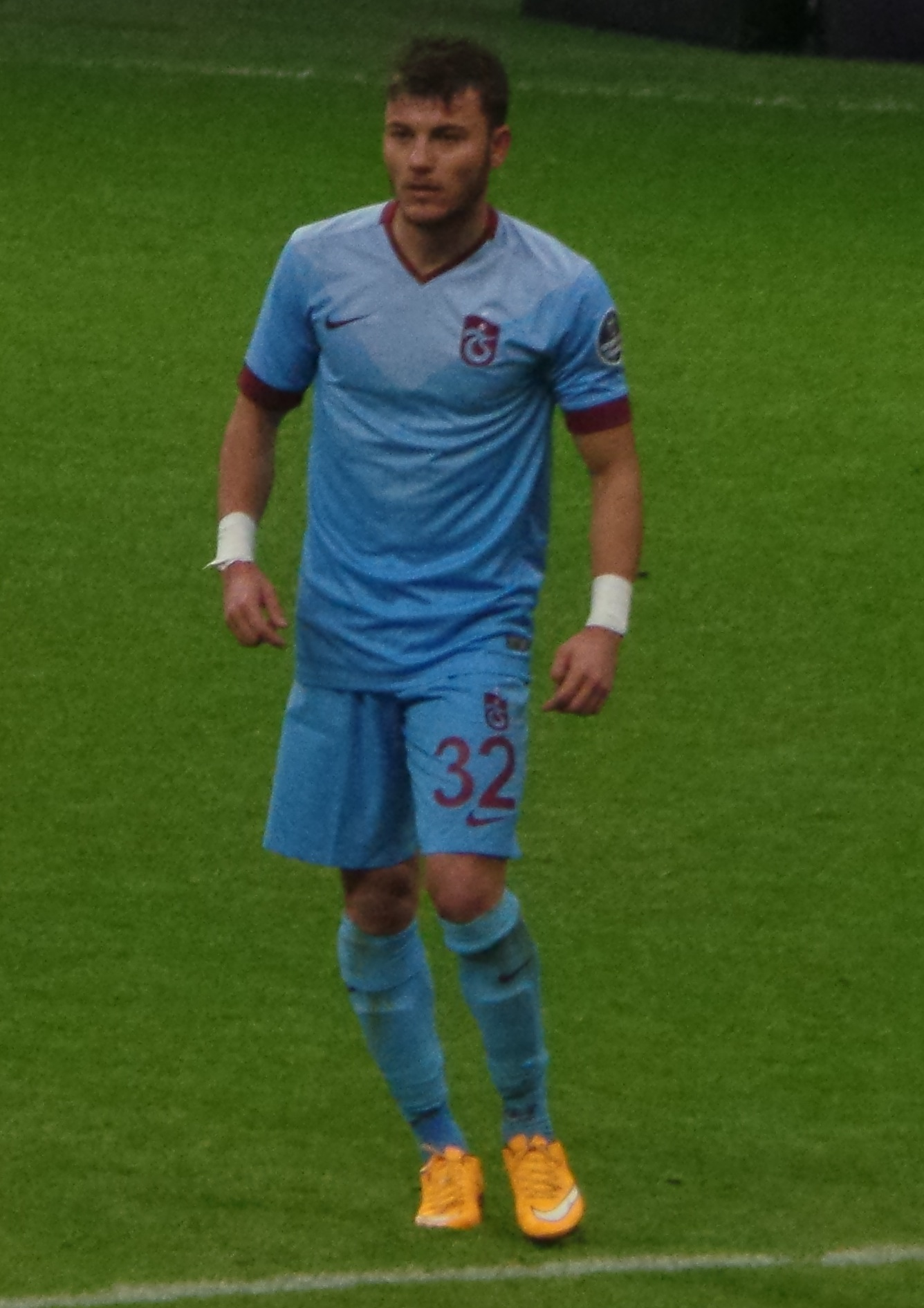 Yusuf Erdoğan